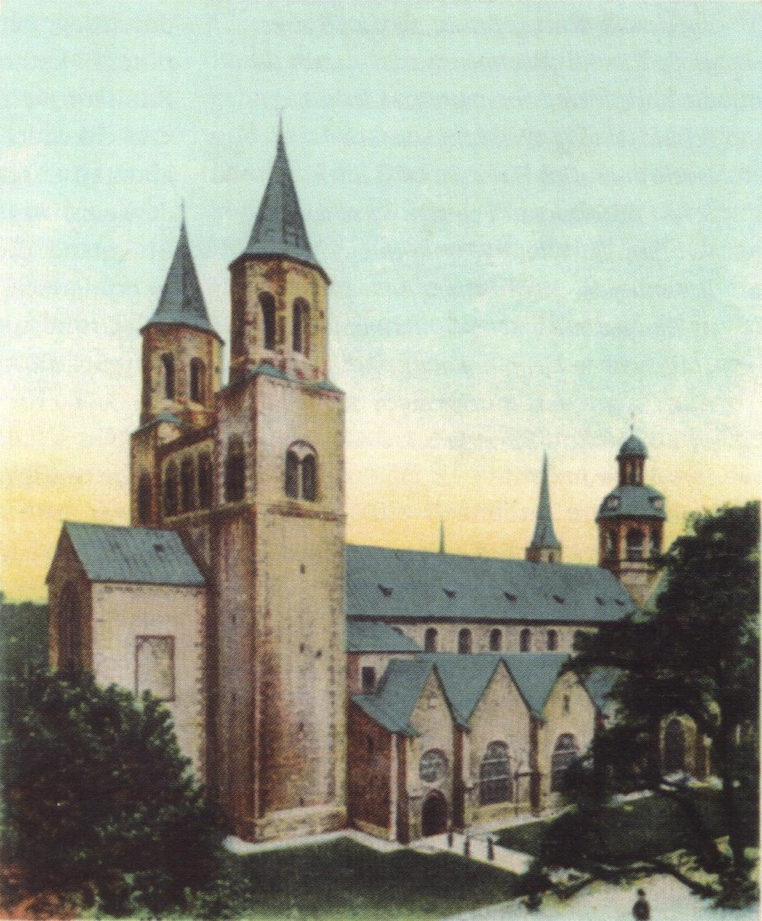 Hildesheim, Dom, mit dem in den 1840er Jahren erbauten neuromanischen Doppelturm-Westwerk